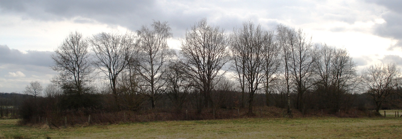 Langbett Langenrehm aus Norden